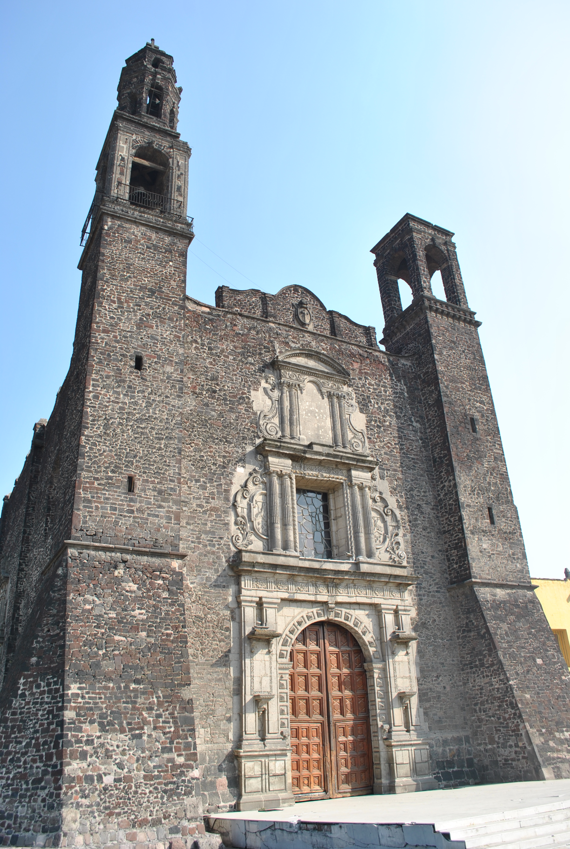 Templo del ex Colegio de la Santa Cruz de Tlatelolco, consagrado hoy a Santiago Apóstol.